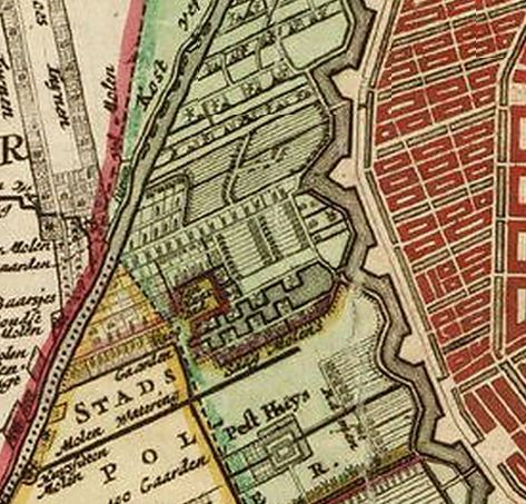 Detail van de kaart van Amstelland uit 1790, gemaakt door de cartograaf en landmeter Gerrit Drogenham. In het midden de Kwakerspoel